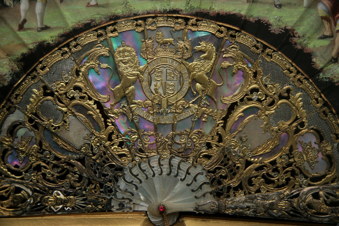 Eventail de la Reine Victoria avec inscription "Honni soit qui mal y pense"